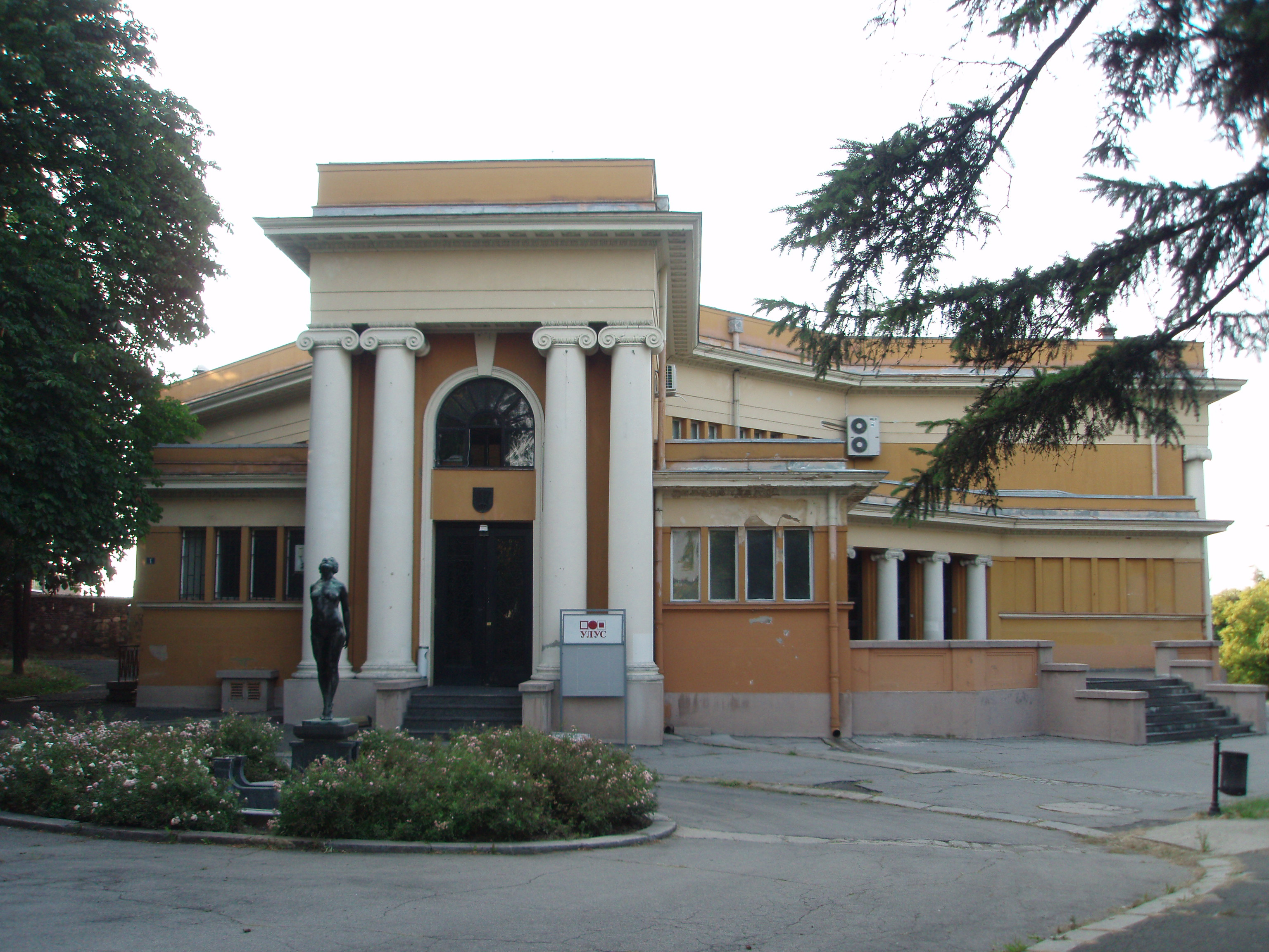 Kalemegdan - Umetnički paviljon “Cvijeta Zuzorić“